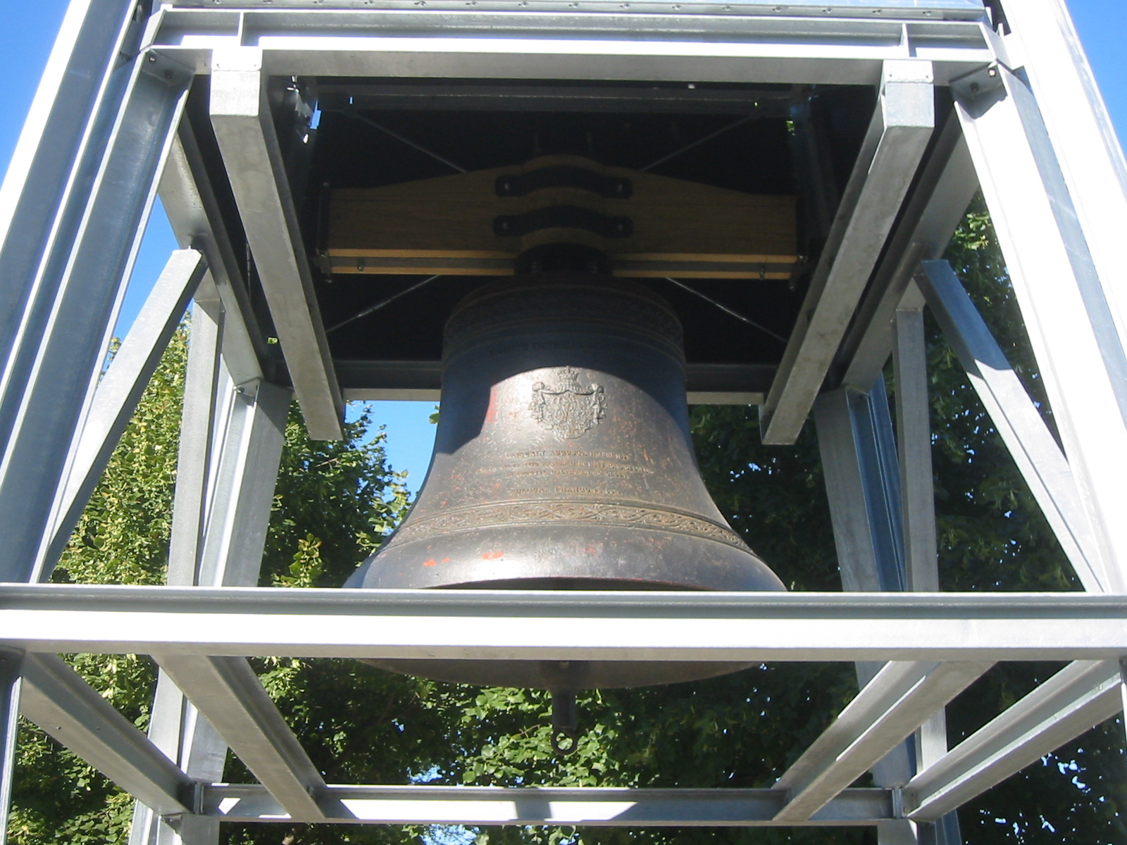 Glockenturm mit der Auguste-Viktoria-Glocke aus der Gnadenkirche in Berlin-Mitte